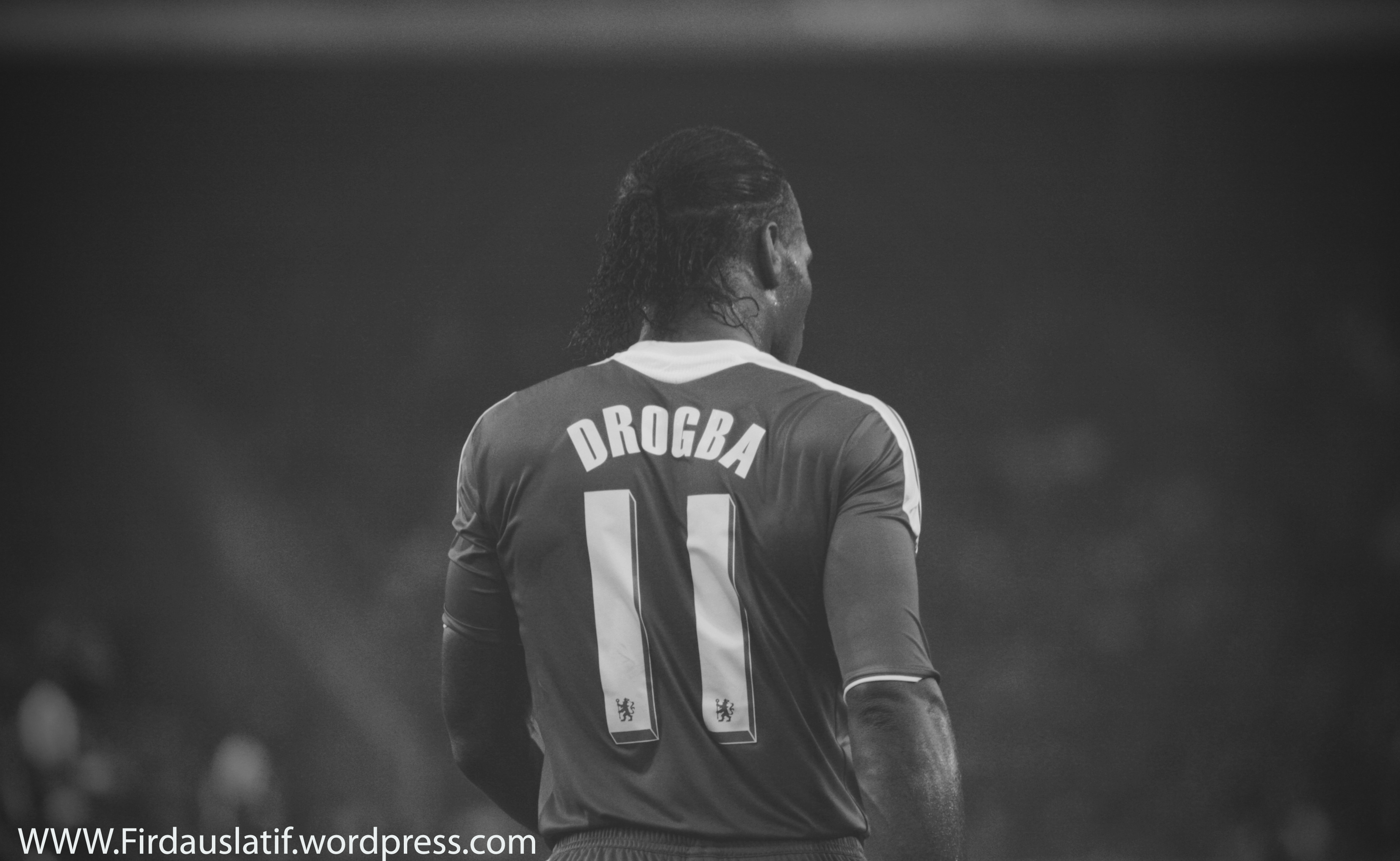 MALAYSIA VS CHELSEA 2011